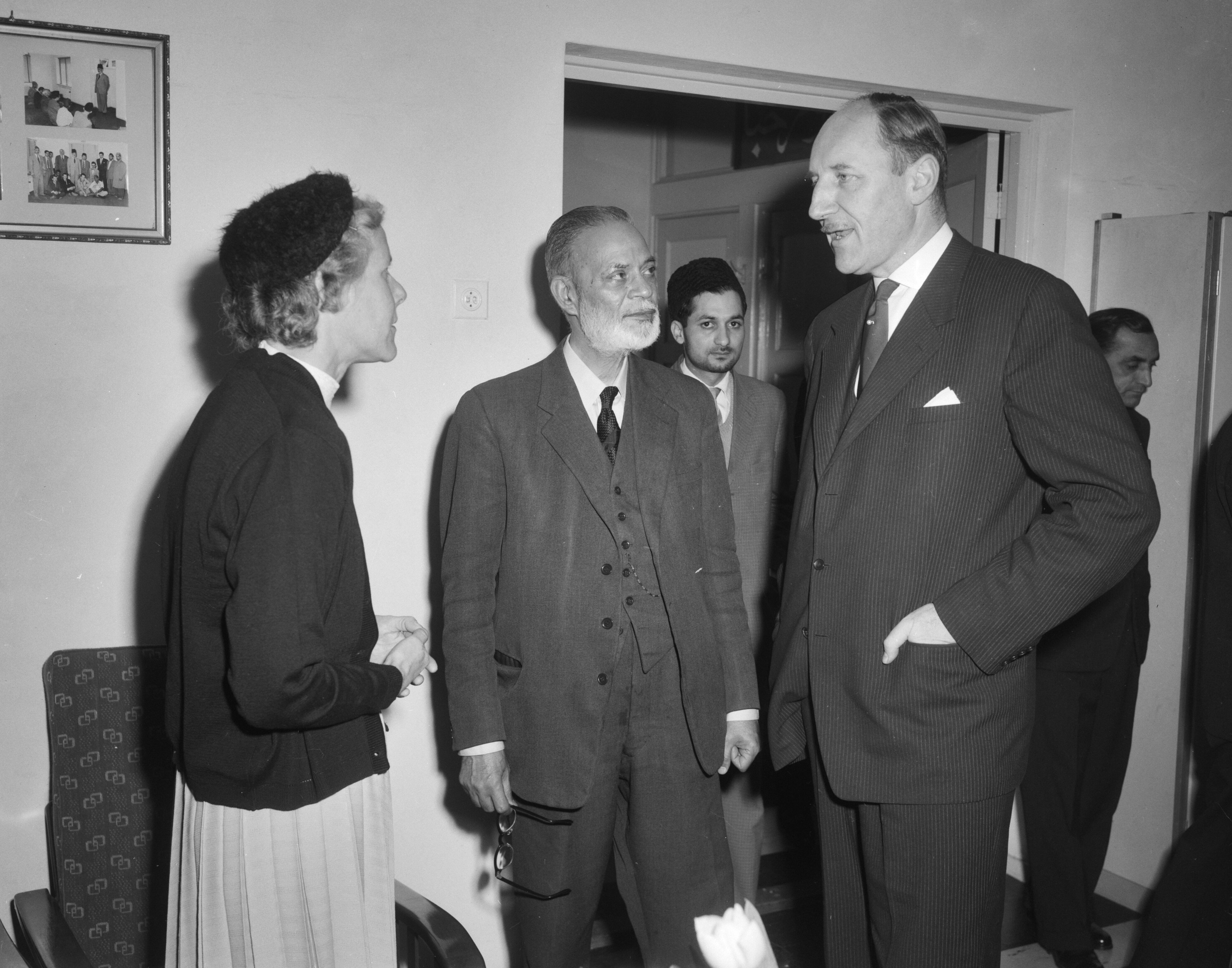 Collectie / Archief : Fotocollectie Anefo Reportage / Serie : [ onbekend ] Beschrijving : Afscheidsreceptie van de vice president van het Internationaal Gerechtshof Sir Mohammed Zafrulla Khan Datum : 4 februari 1961 Trefwoorden : afscheidsrecepties Persoonsnaam : Zafrulla Khan, Mohammed Fotograaf : Behrens, Herbert / Anefo Auteursrechthebbende : Nationaal Archief Materiaalsoort : Negatief (zwart/wit) Nummer archiefinventaris : bekijk toegang 2.24.01.04 Bestanddeelnummer : 912-0478